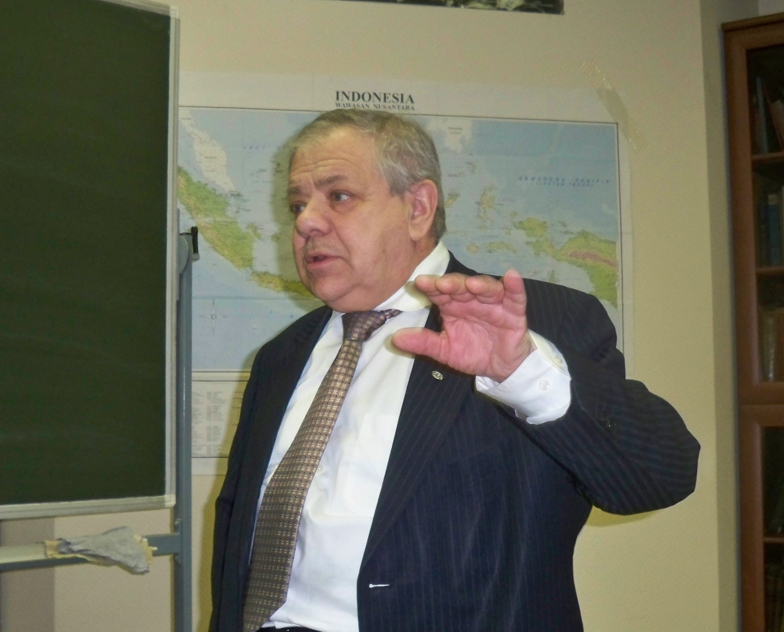 Членов Михаил Анатольевич